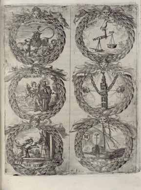 Grabado al aguafuerte publicado en la obra de Fernando de la Torre Farfán, Fiestas de la S. Iglesia metropolitana y patriarcal de Sevilla al nuevo culto del ... rey S. Fernando el tercero de Castilla y de Leon ... (En Sevilla : en casa de la viuda de Nicolàs Rodriguez, 1671